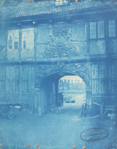 Es ist das Hauptportal auf der Westseite des Bauhofs am Deichtor zu sehen. Lichtpause einer Fotografie von C. F. Höge, vermutlich entstanden 1850-1865.